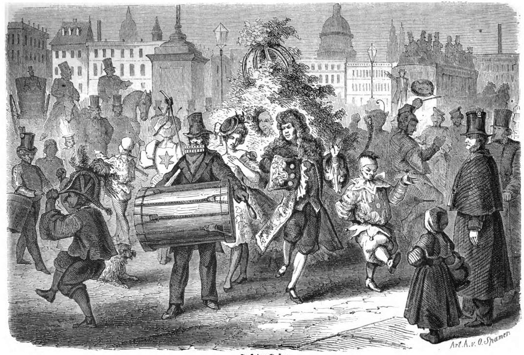 Jack im Grünen